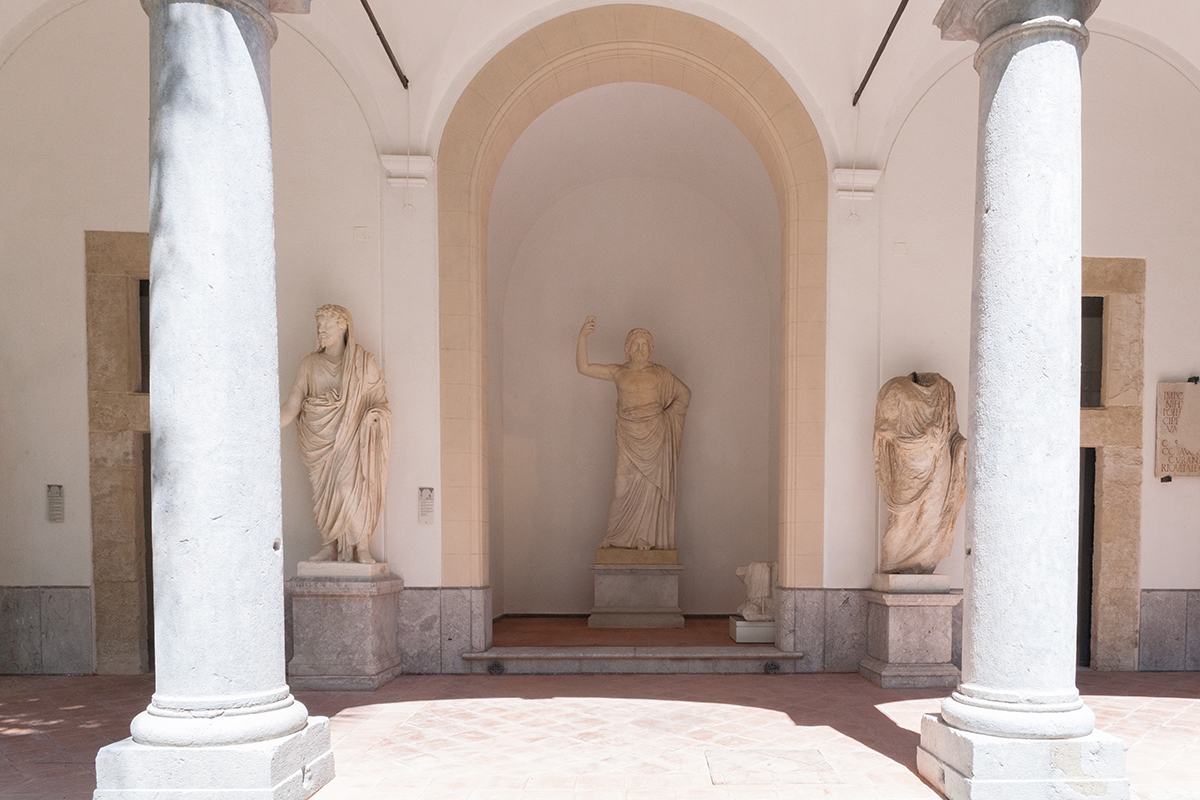 Statua di Zeus